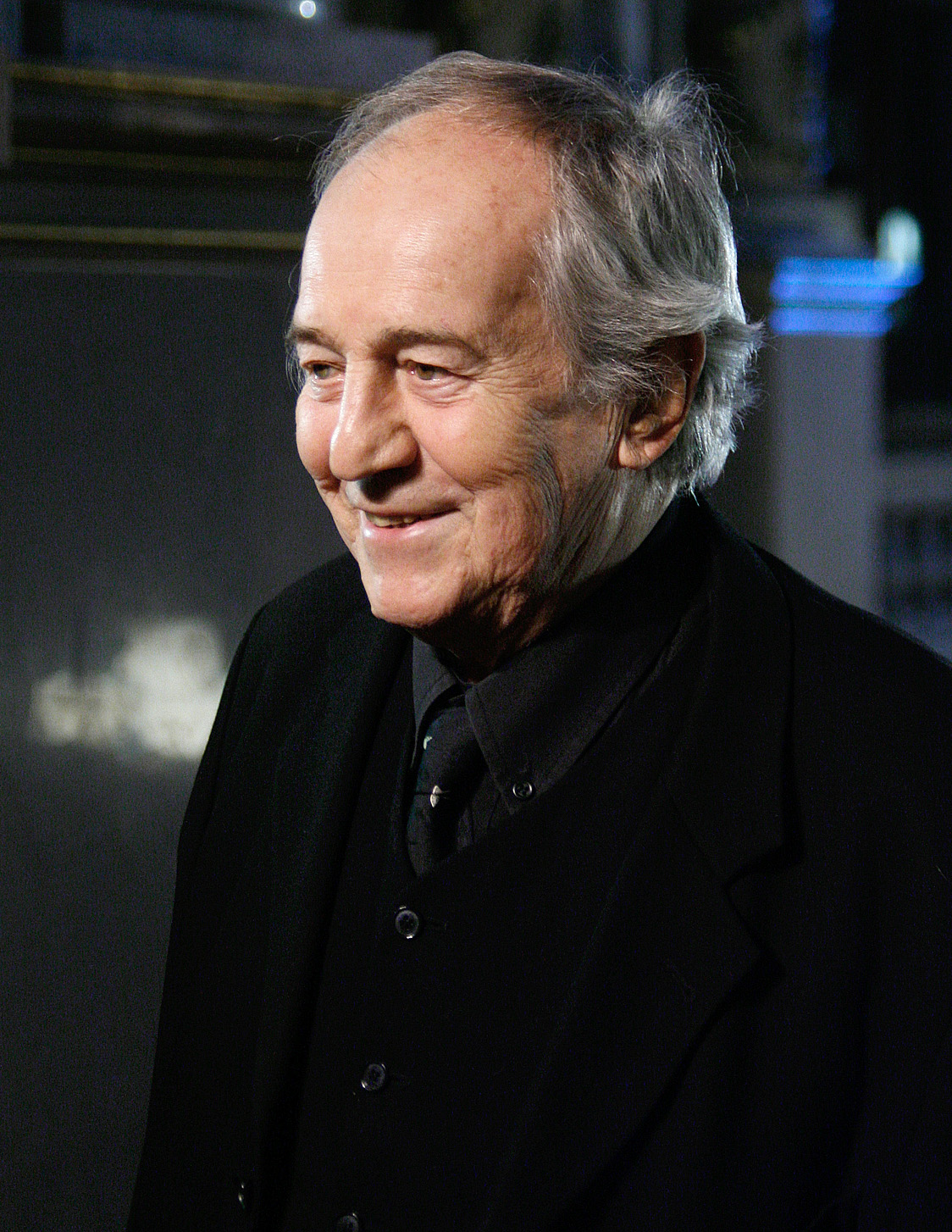 Otto Schenk zu Gast bei der Verleihung des Nestroy-Theaterpreises 2010 im Burgtheater in Wien.